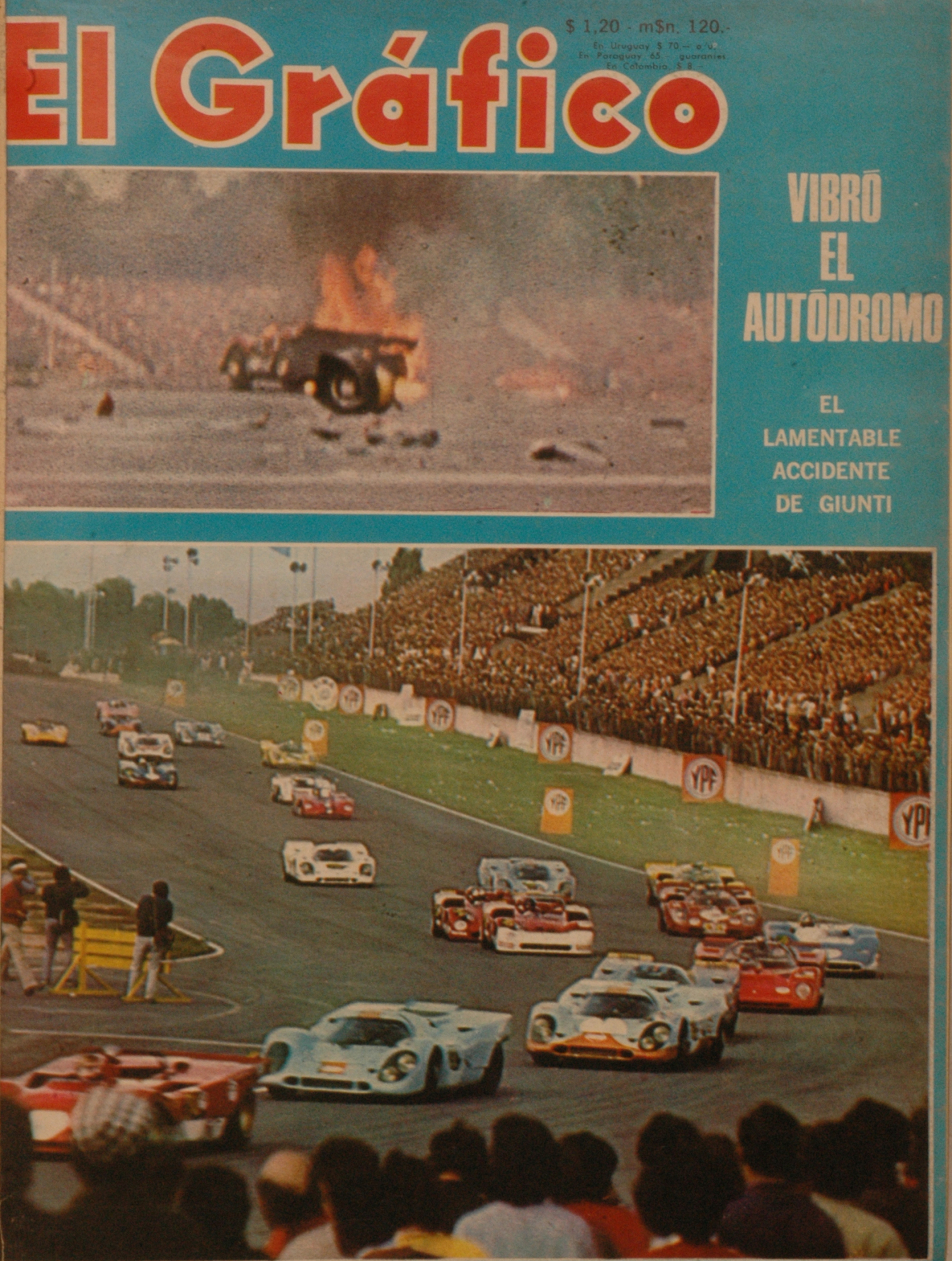 El Grafico del 12 de Enero de 1971. Edicion 2675